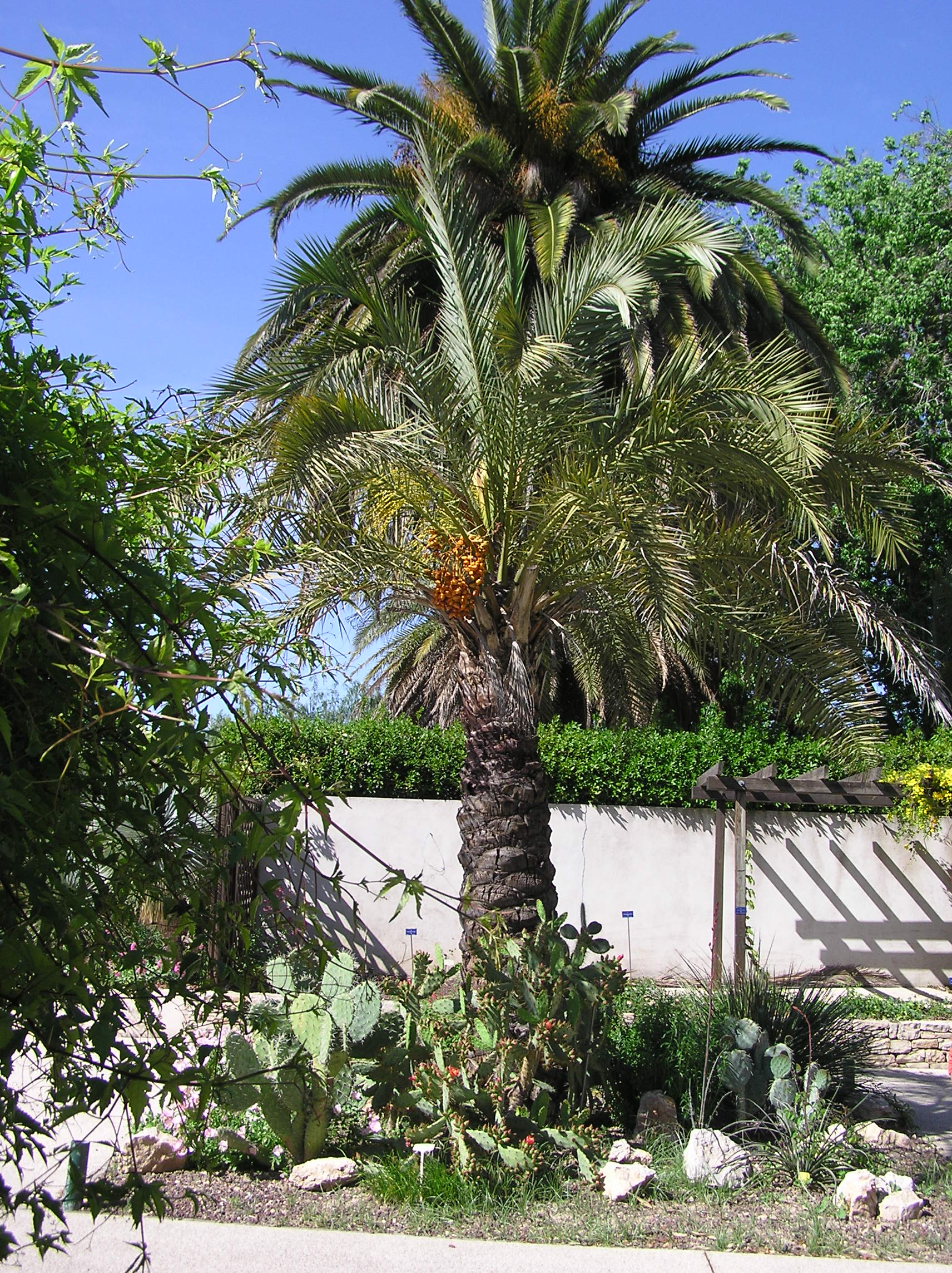 Palmier dattier (Phoenix dactylifera) au Jardin Botanique de Marseille.